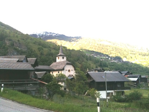 Inden VS, Kanton Wallis